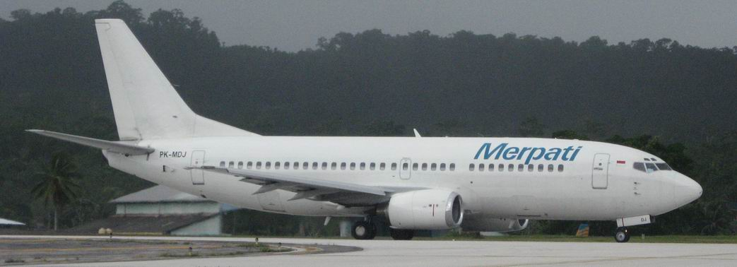 Merpati Nusantara Airlines Boeing 737-300 at Frans Kaisiepo Airport of Biak